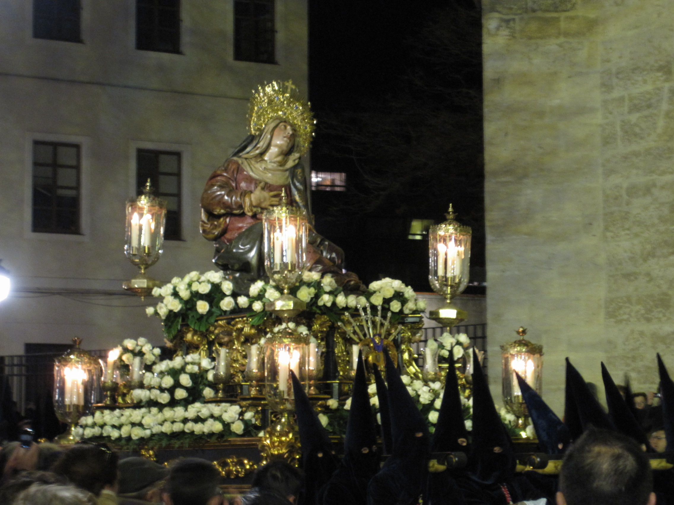 Nuestra Señora de las Angustias. Ilustre Cofradía Penitencial de Nuestra Señora de las Angustias, Valladolid (España).